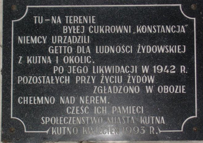 Tablica pamiątkowa (rok wmurowania 1993).